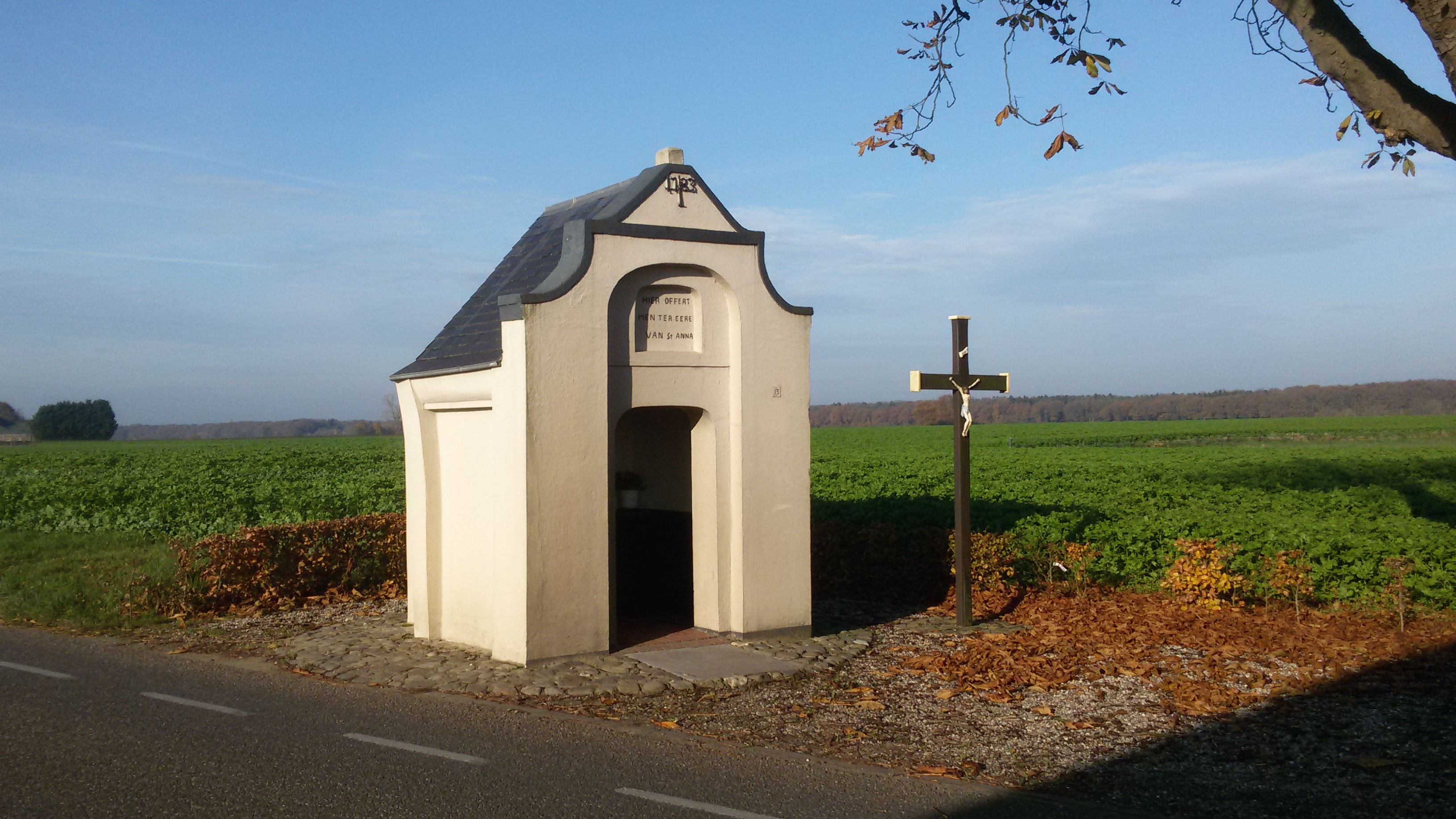 Sint Annakapel gelegen aan de Blitterswijckseweg 13 in Broekhuizenvorst-Ooijen